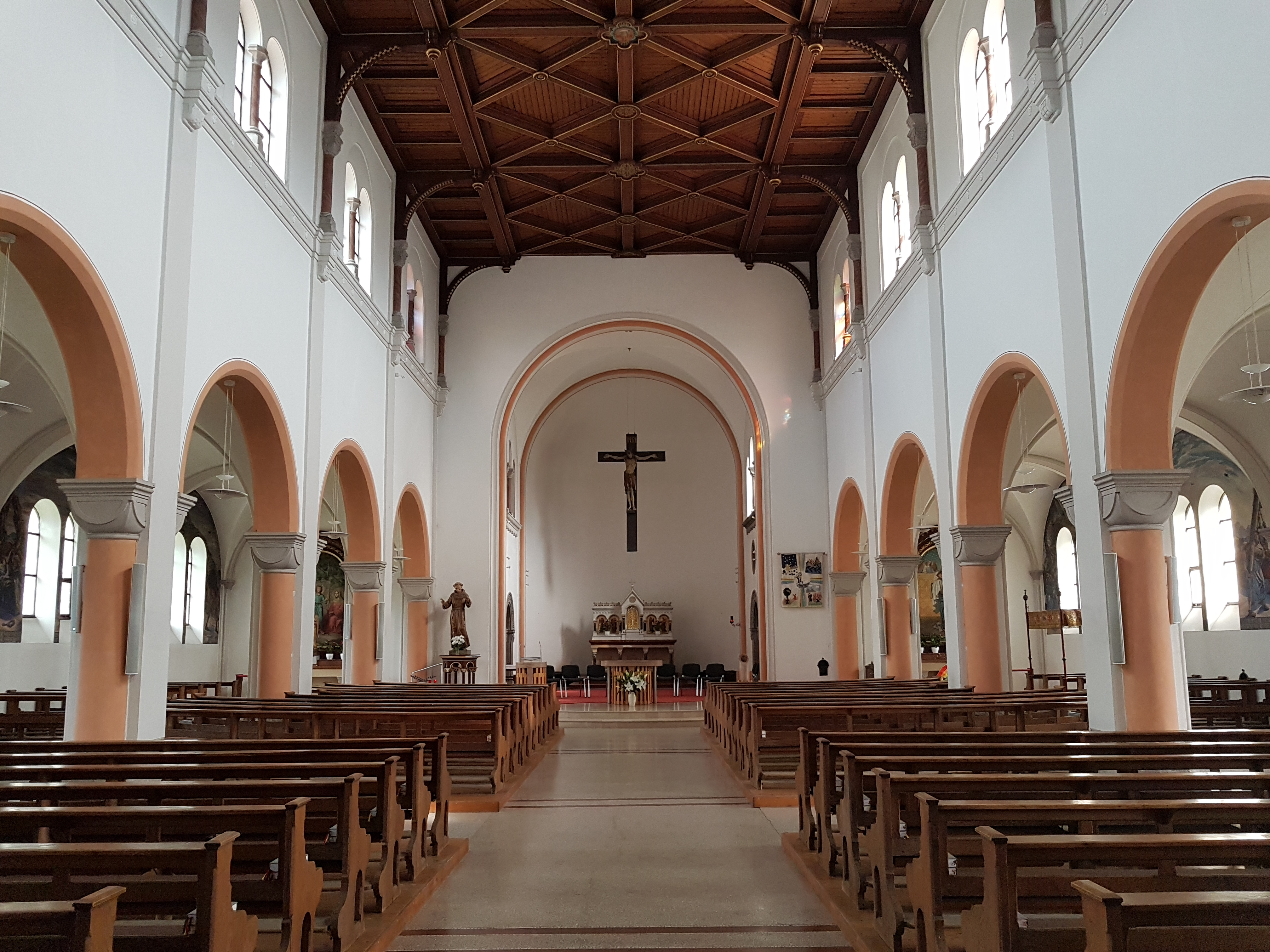 Pfarrkirche Salzburg-Itzling